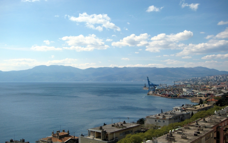 pogled na Kvarnerski zaljev, Učku, Rijeku